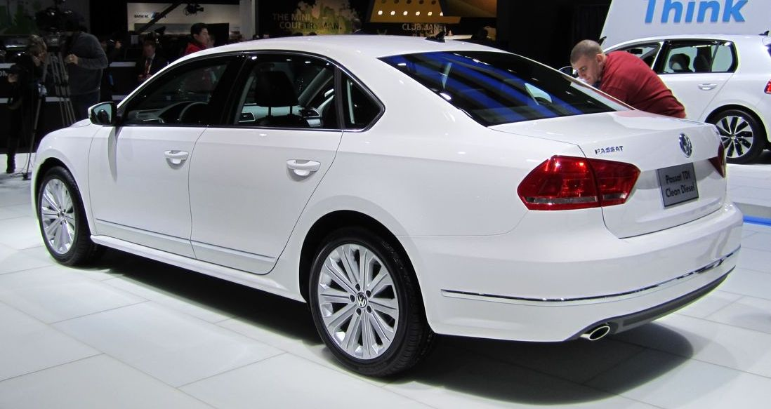 2012 Volkswagen Passat NMS TDI Clean Diesel at the 2011 NAIAS